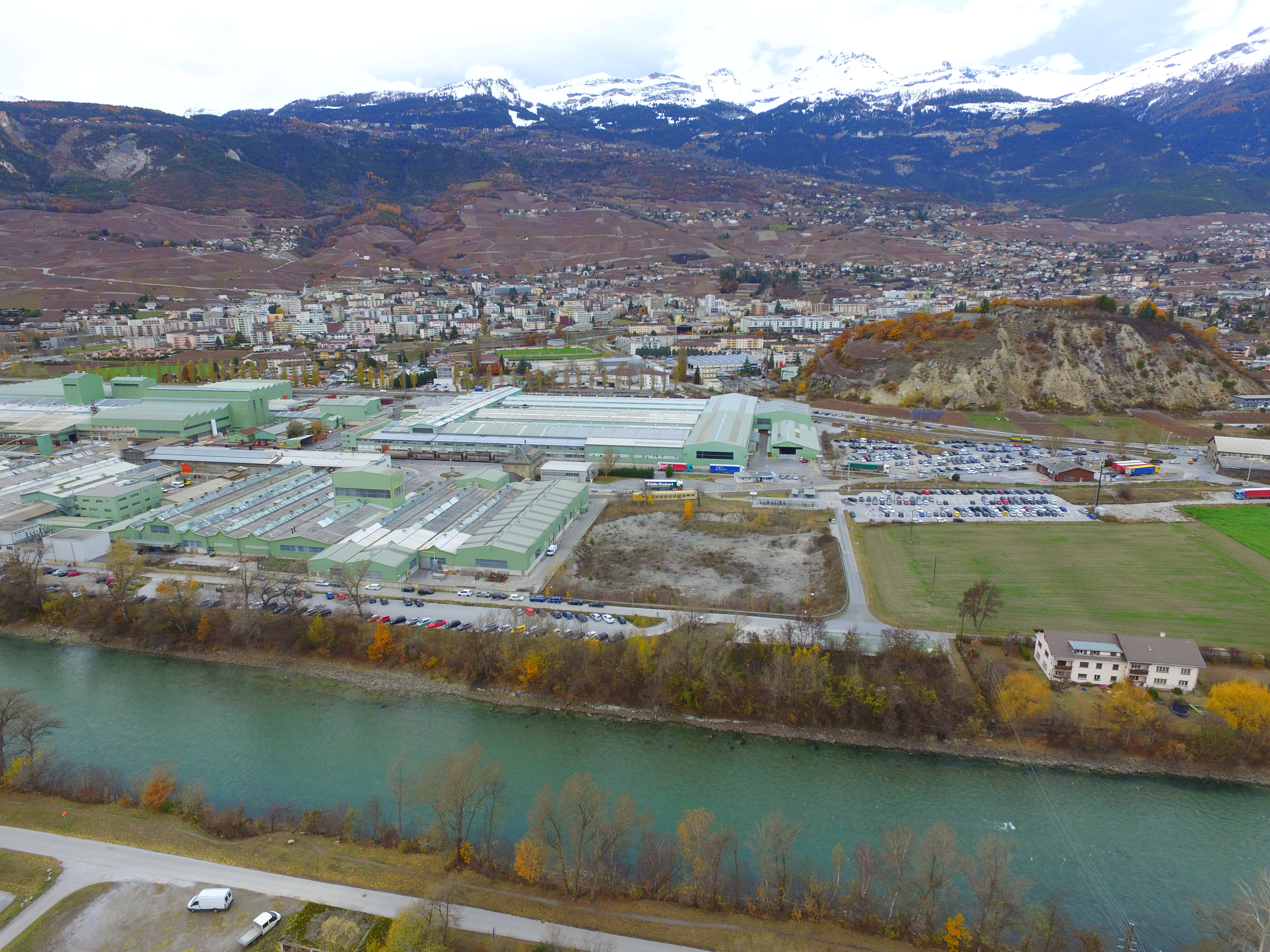 Novelis Switzerland SA, Sierre, aerial